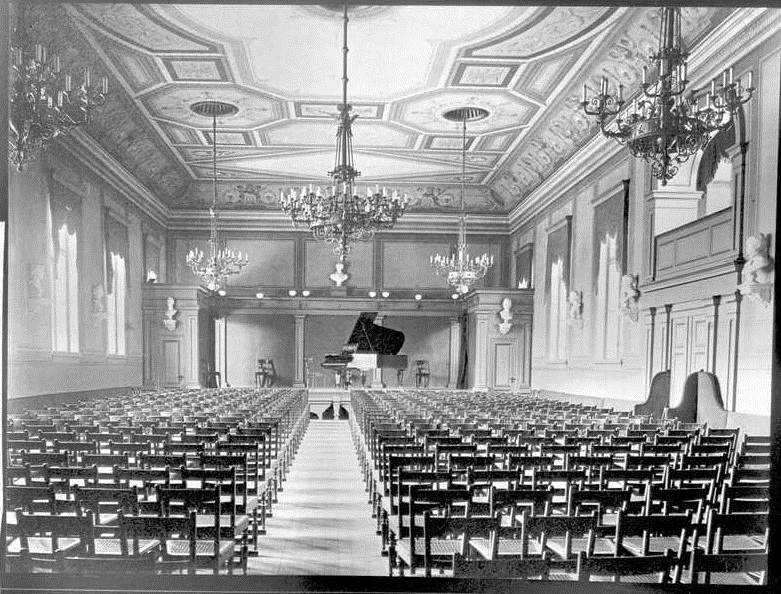 Brødrene Hals' pianofabrikk og konsertsal, som åpnet i 1880 og ble revet i 1930. Konsertsalen ble innviet med en konsert hvor Johan Halvorsen dirigerte sin 4. rapsodi tilegnet Hals.